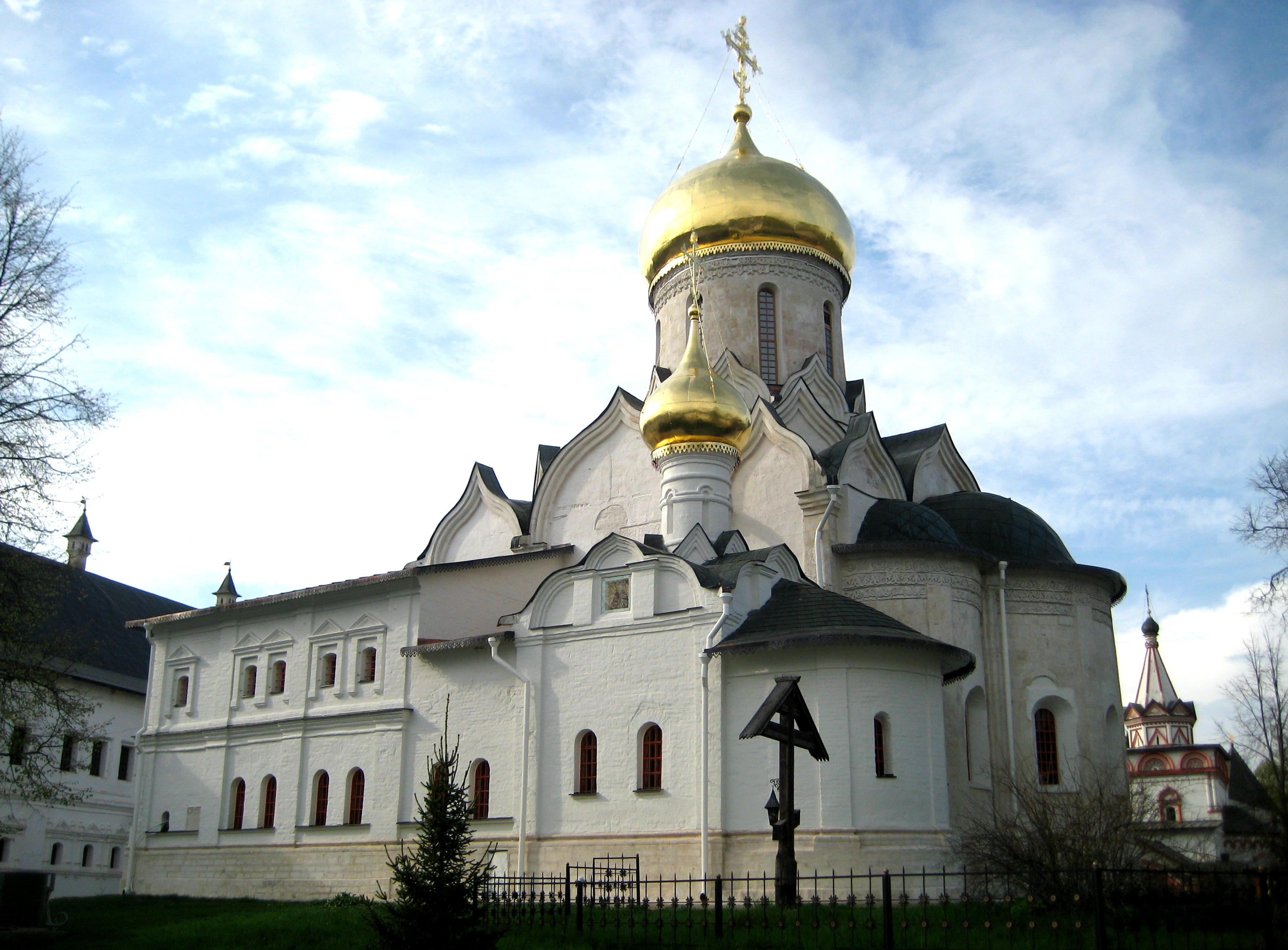 Саввино-Сторожевский монастырь